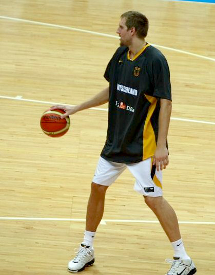 Dirk Nowitzki，德克·诺维茨基, in Nanjing